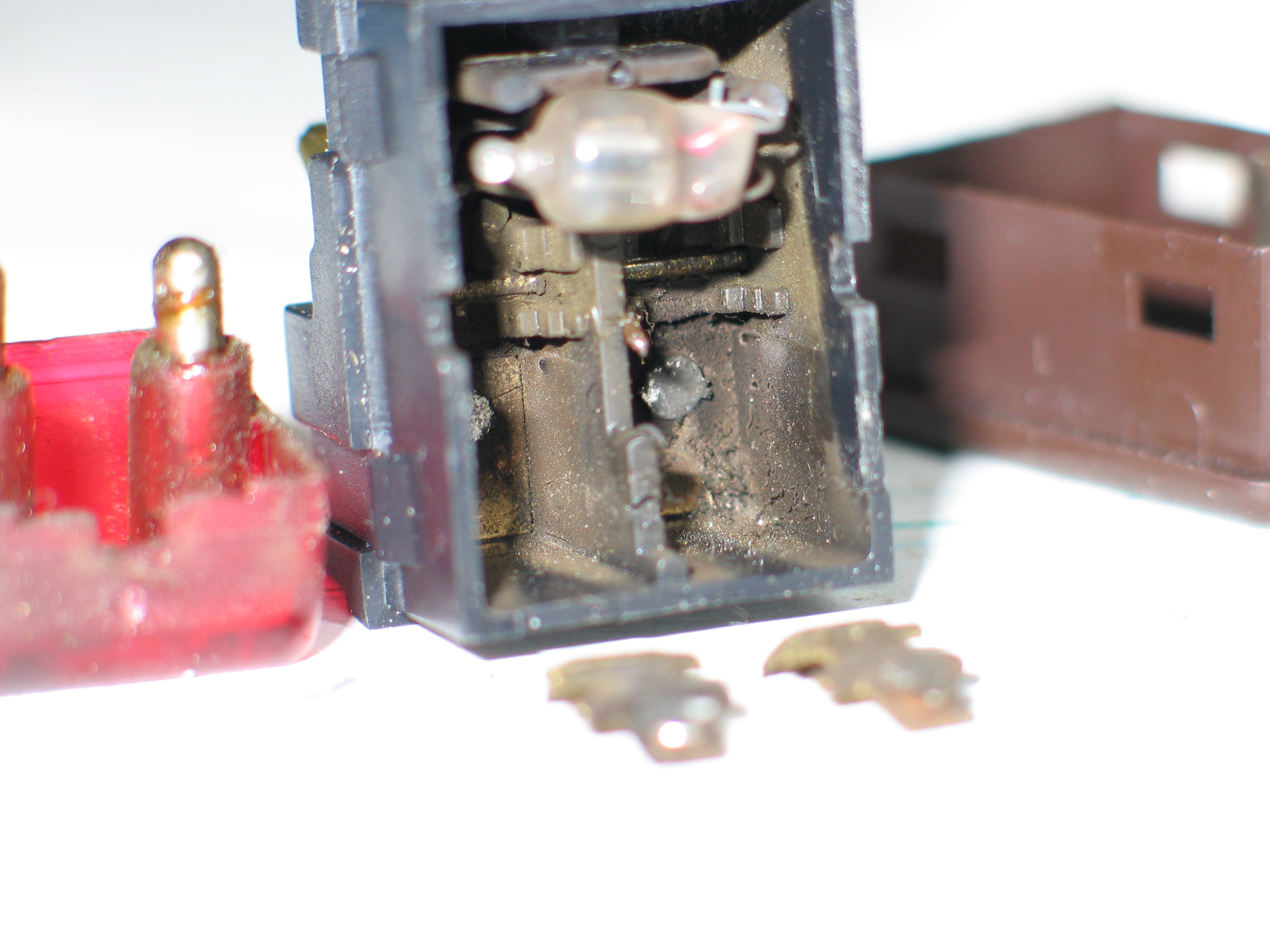 Defekter Kippschalter